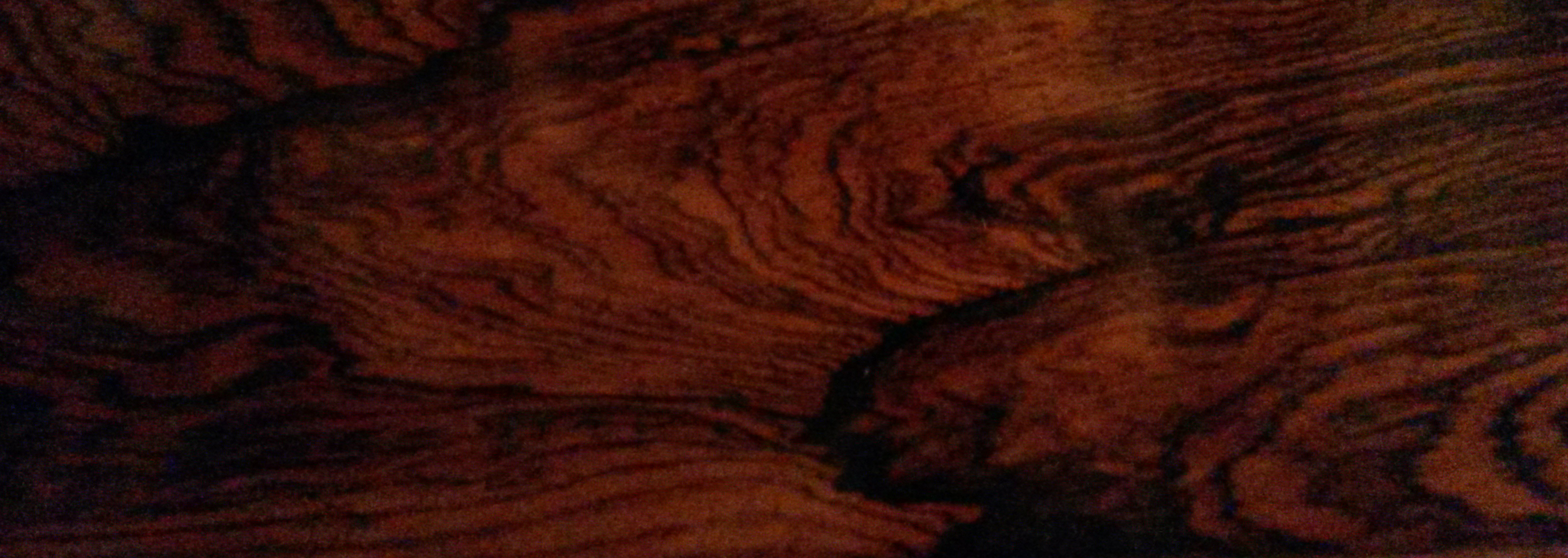 Palissandre de RIO du XVIIIème siècle